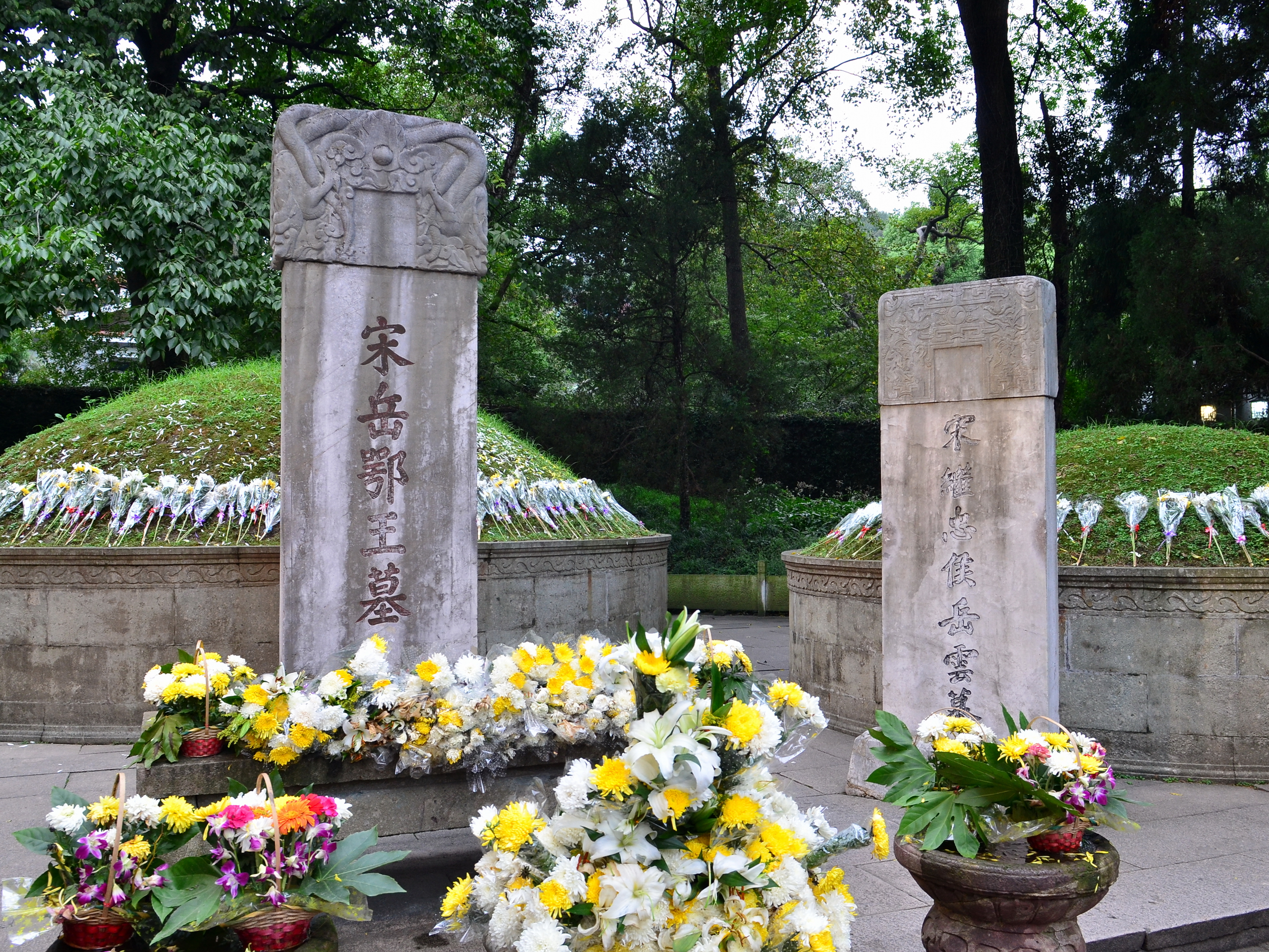 杭州岳王庙岳坟，岳飞墓墓碑上刻“宋岳鄂王墓”，其子岳云墓墓碑上刻“宋继忠侯岳云墓”。